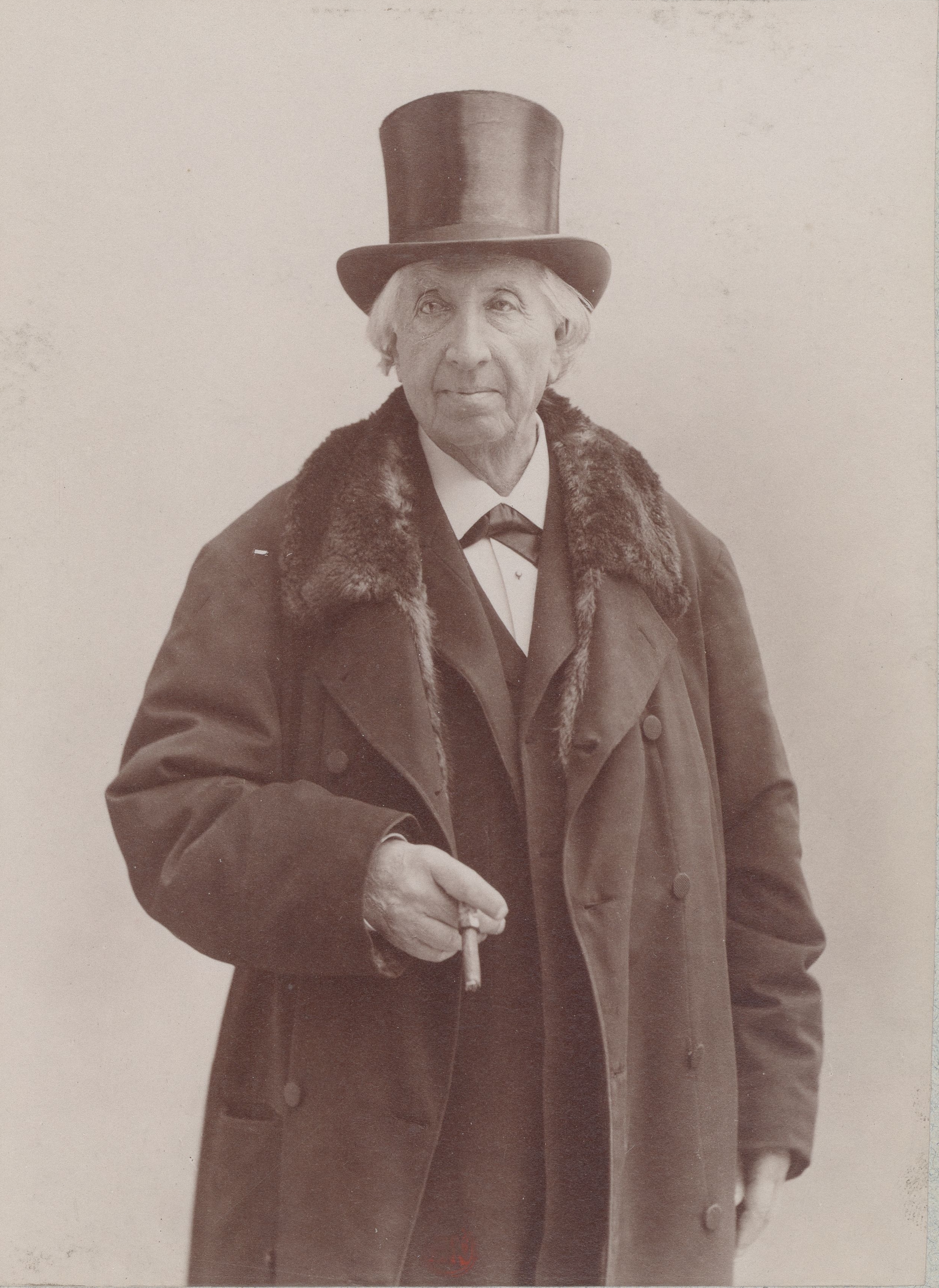 Photographie d' Emmanuel Arago par Nadar dans les années 1890